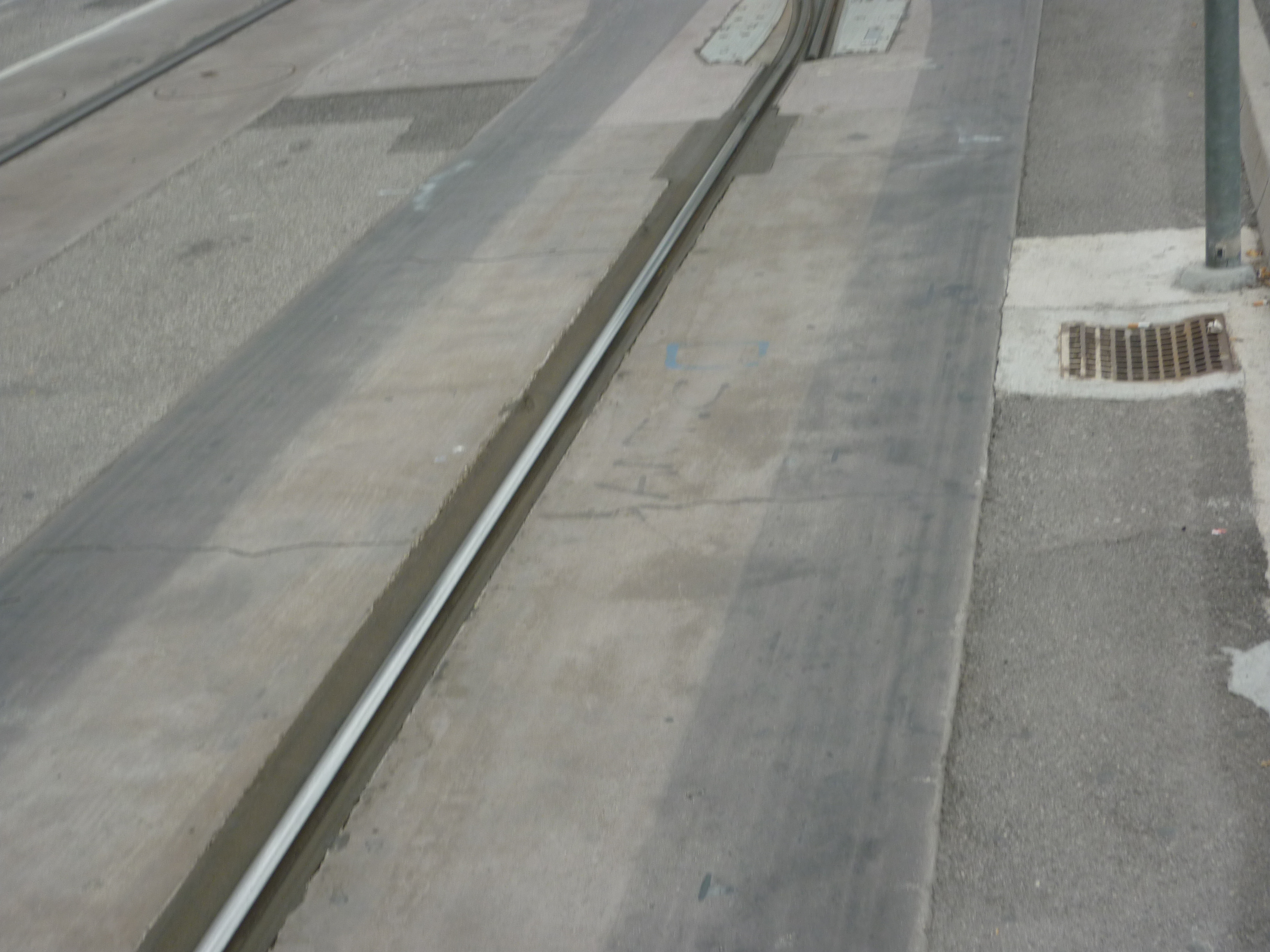 tram translohr